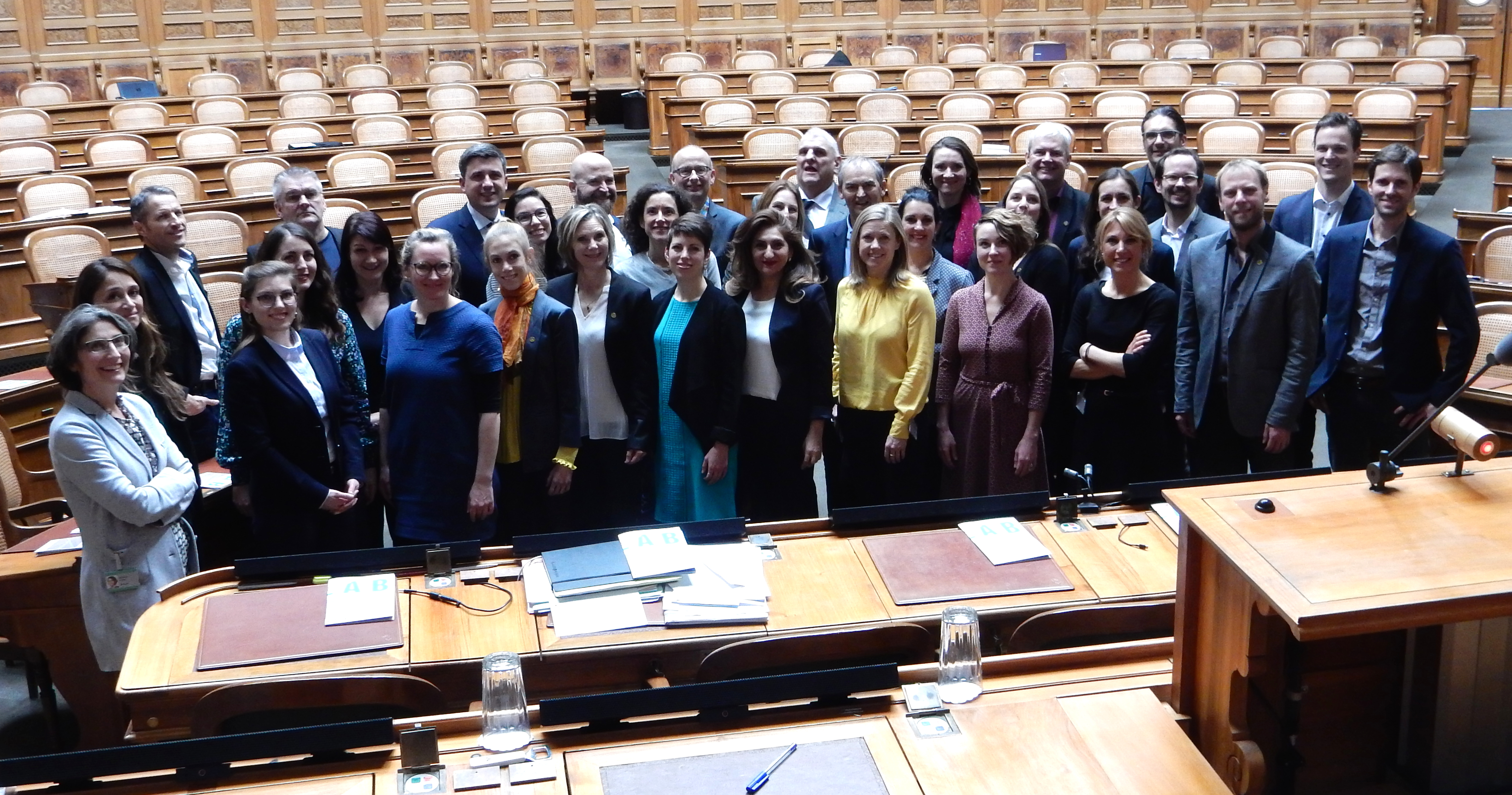 Schweiz: die stark gewachsene Grüne Fraktion der Bundesversammlung nach den Parlamentswahlen 2019